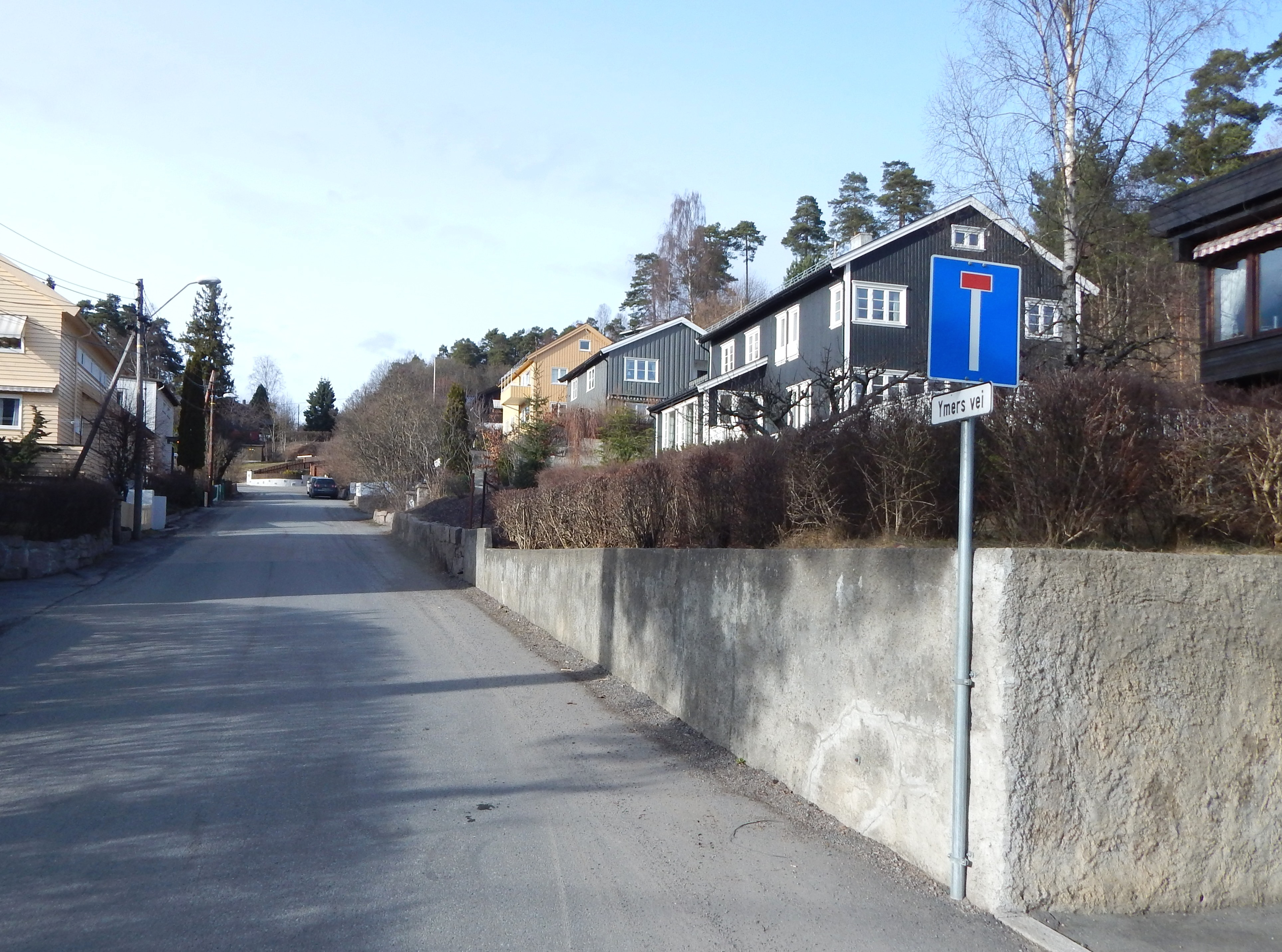 Ymers vei sett fra Mons Søviks plass